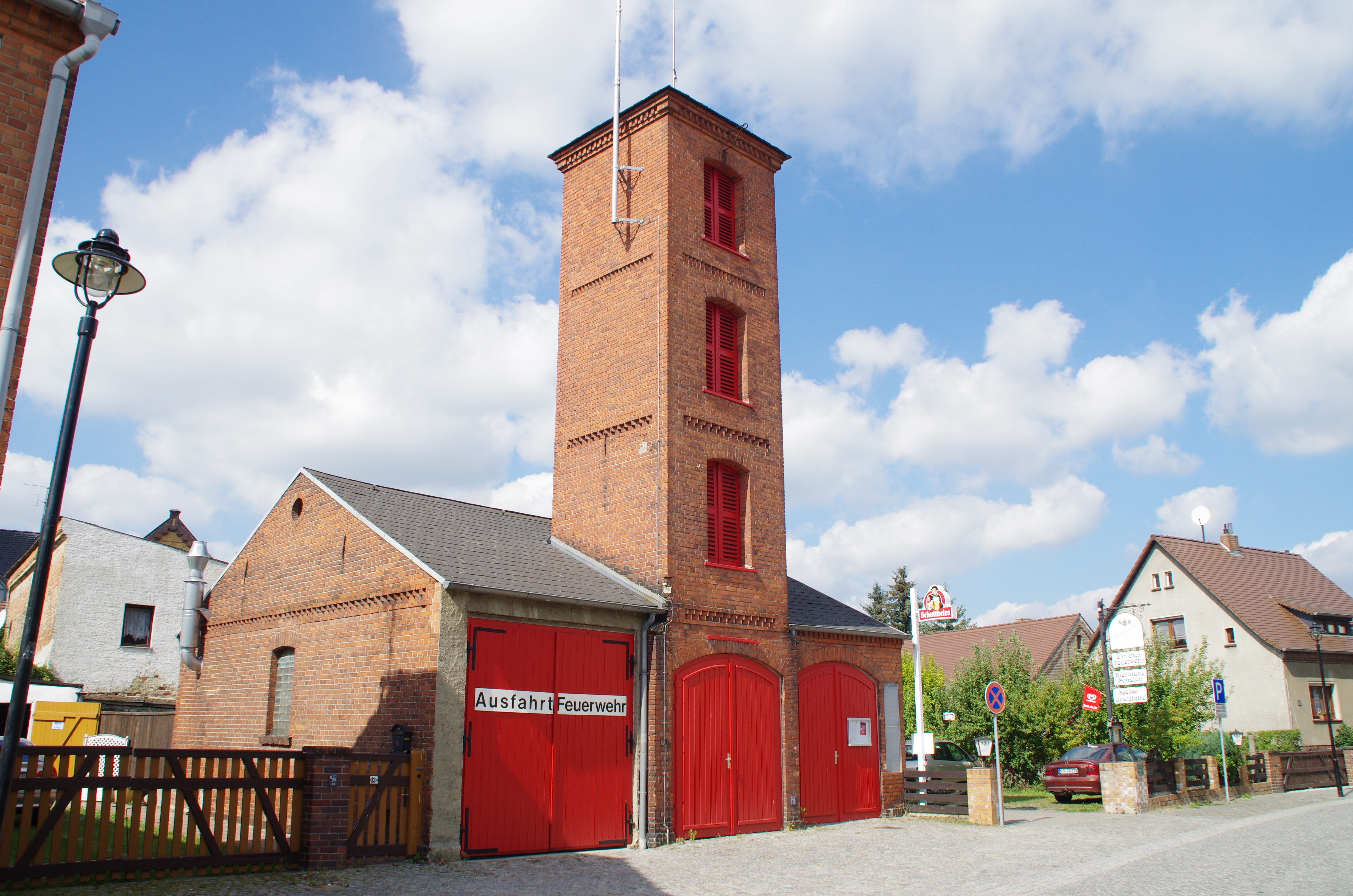 Lübbenau/Spreewald in Brandenburg. Das Gebäude Spreestraße 12 steht unter Denkmalschutz.